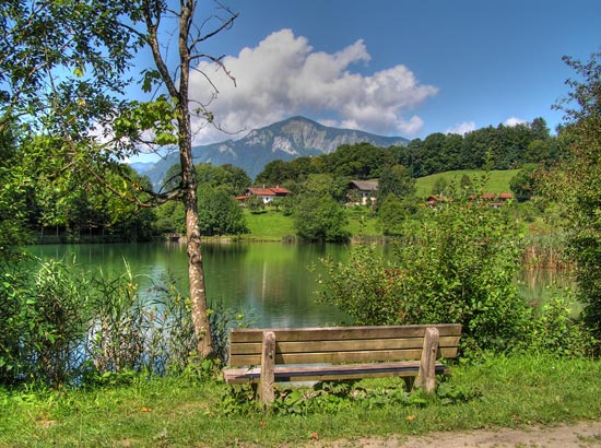 Blick vom Ostufer des Wössner Sees in Unterwössen in Richtung Hochplatte